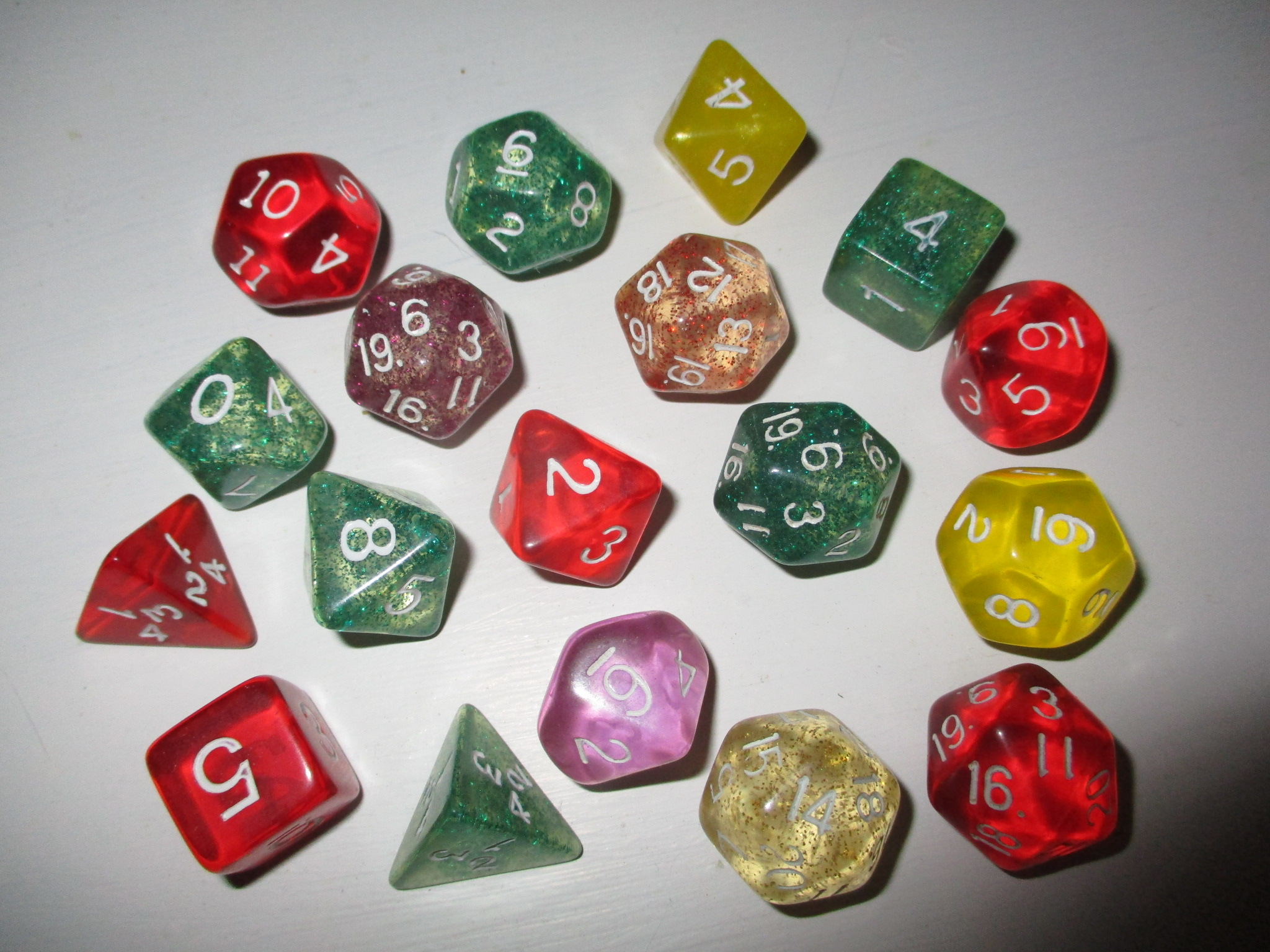 Collection de dés de 4, 6, 8, 10, 12, et 20 faces